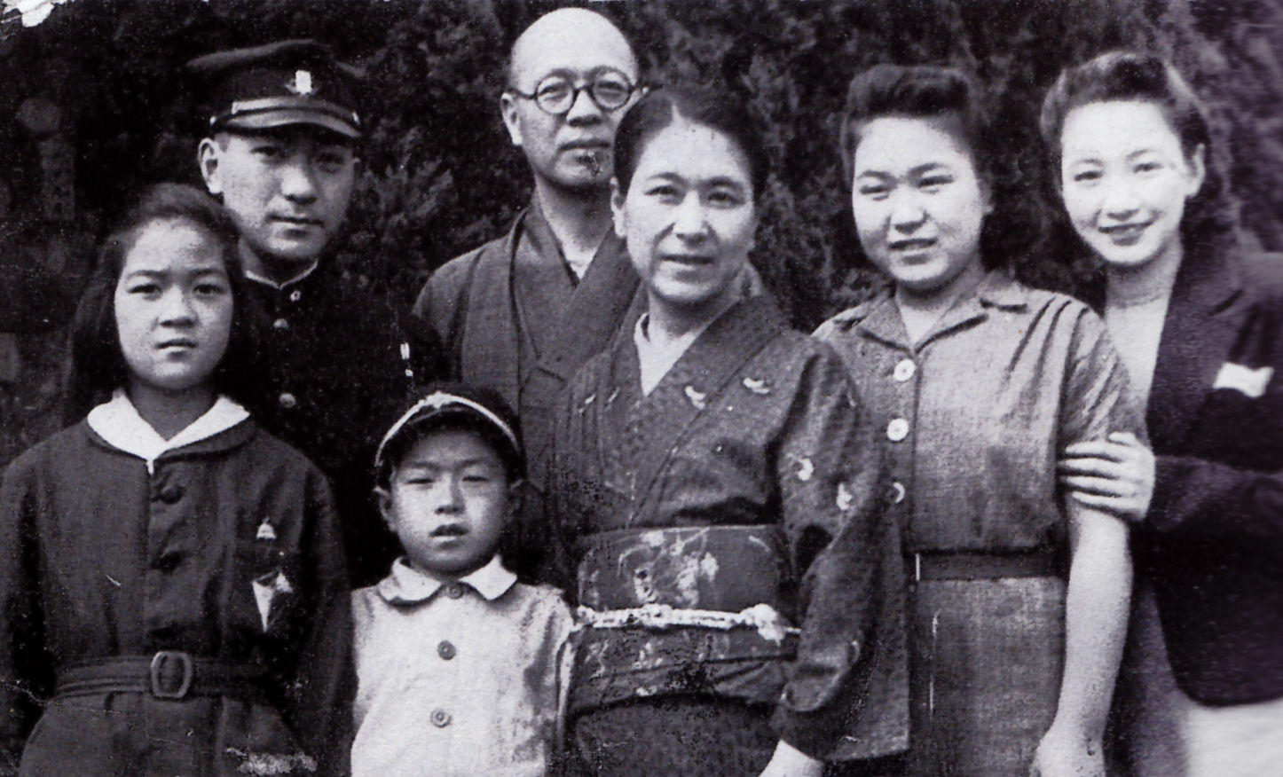 園井恵子と後援者の中井家の人々